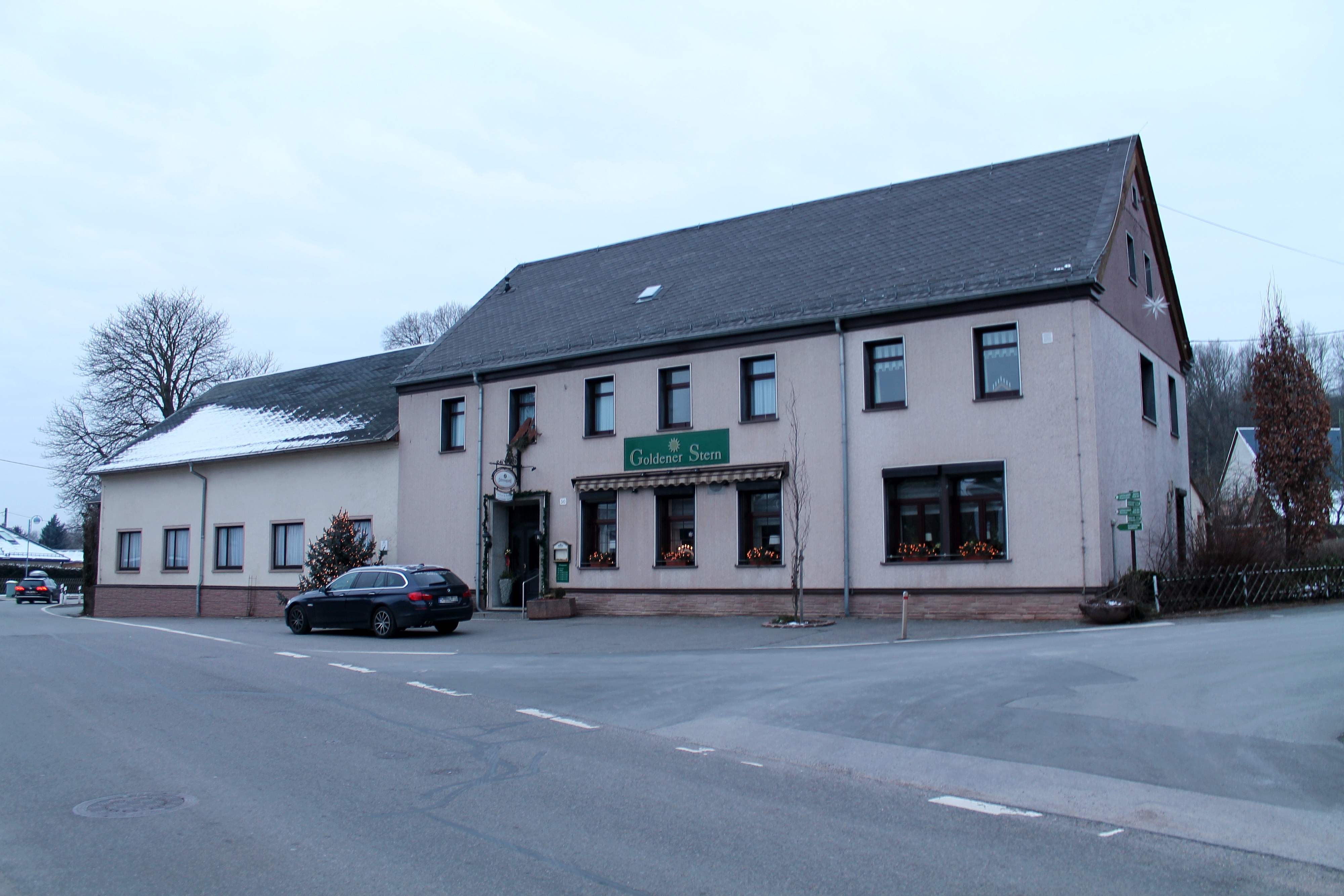 Gasthof "Goldener Stern" in Rüsdorf